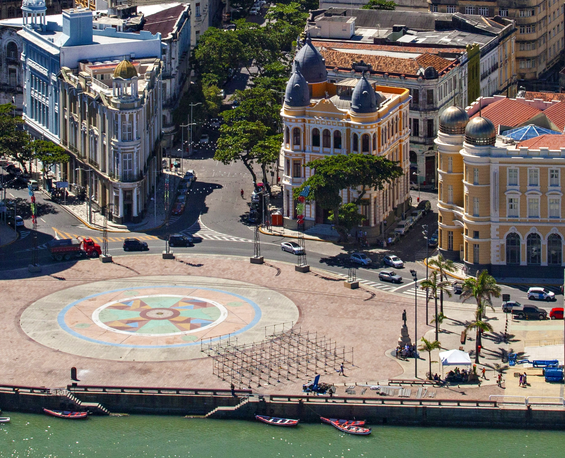 Rosa dos ventos de Cícero Dias, no piso do Marco Zero - Recife - Pernambuco - Brasil